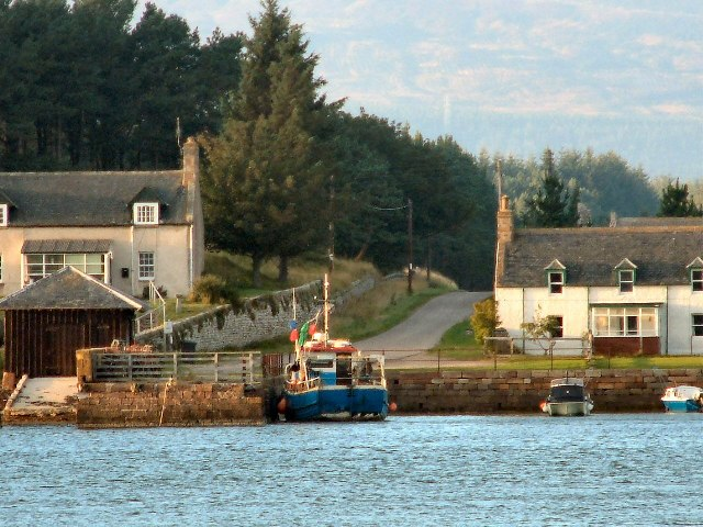 Littleferry Pier